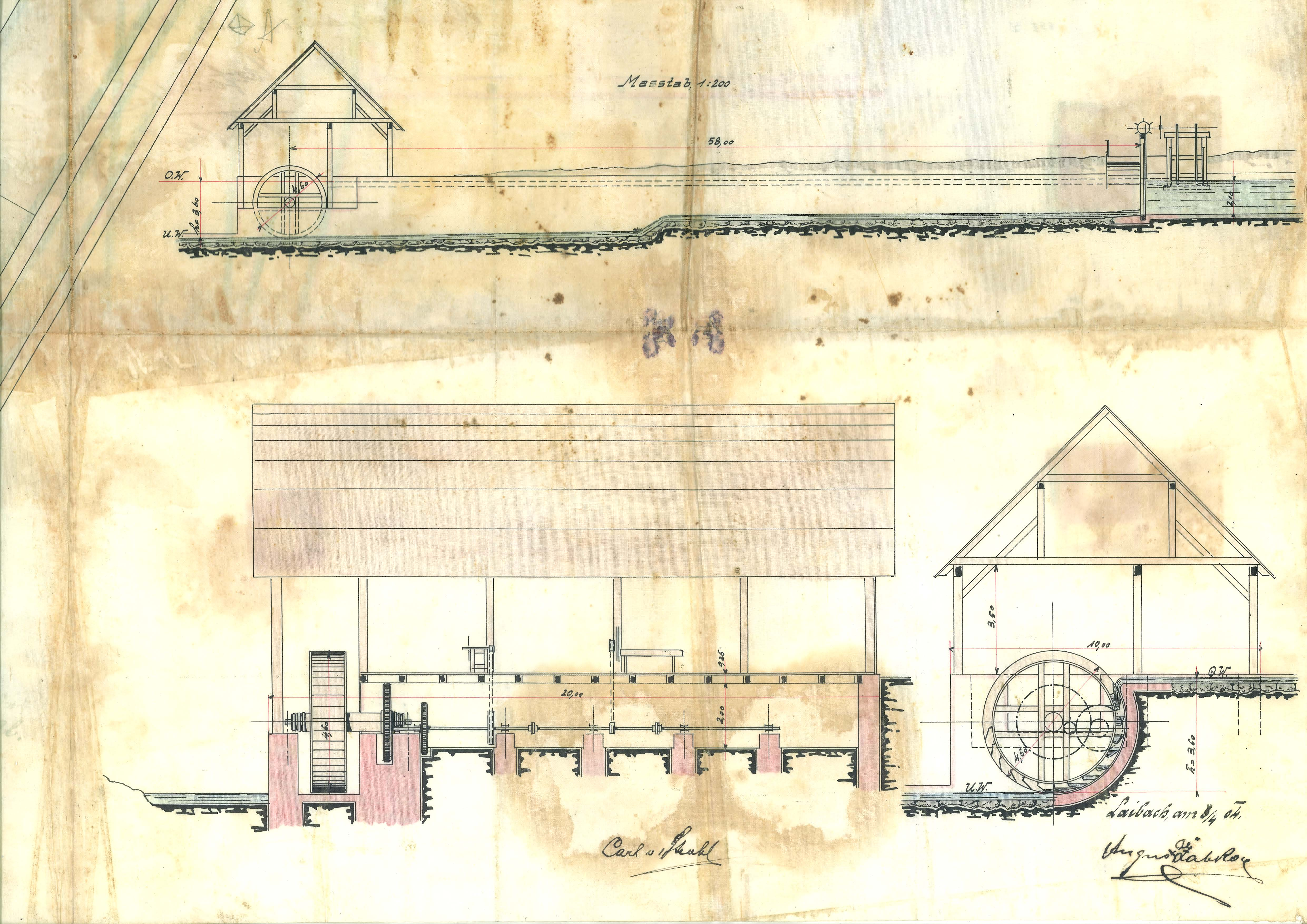 Načrt starološkega vodovoda.